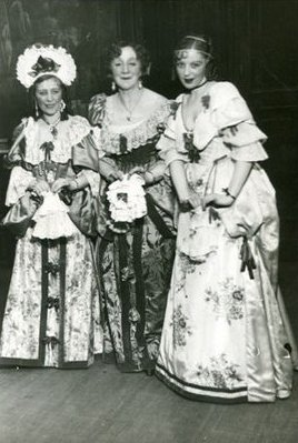 Moliere: Tudós nők. Társulat: Nemzeti Színház, Budapest. Bemutató: 1934.12.04. Rendező: Siklóssy Pál. Szereplők: Belise, Chrisale testvérhúga: Vaszary Piri, Philaminte, Chrisale neje: Hettyey Aranka, Armande, Chrisale leánya: Perczel Zita.